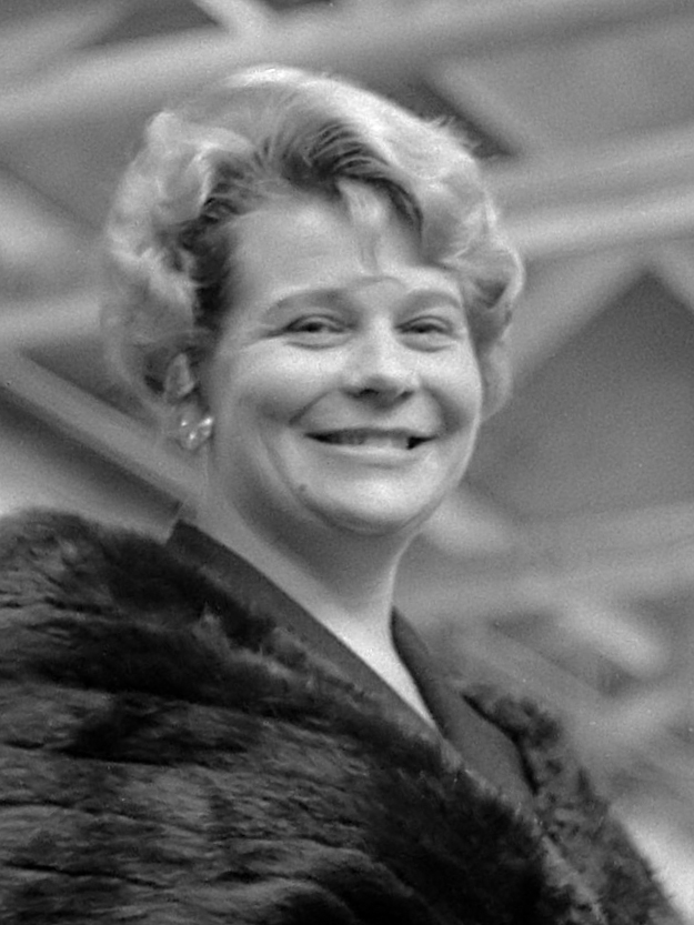 Uitreiking 3000 culturele jeugdpaspoort. De operazangeres Annie Delorie en Elzo Schorting 2 oktober 1961